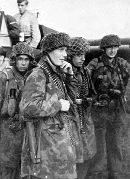 Soldaten des SS-Fallschirmjäger-Bataillons 500 bereiten sich auf Unternehmen Rösselsprung vor (1944).